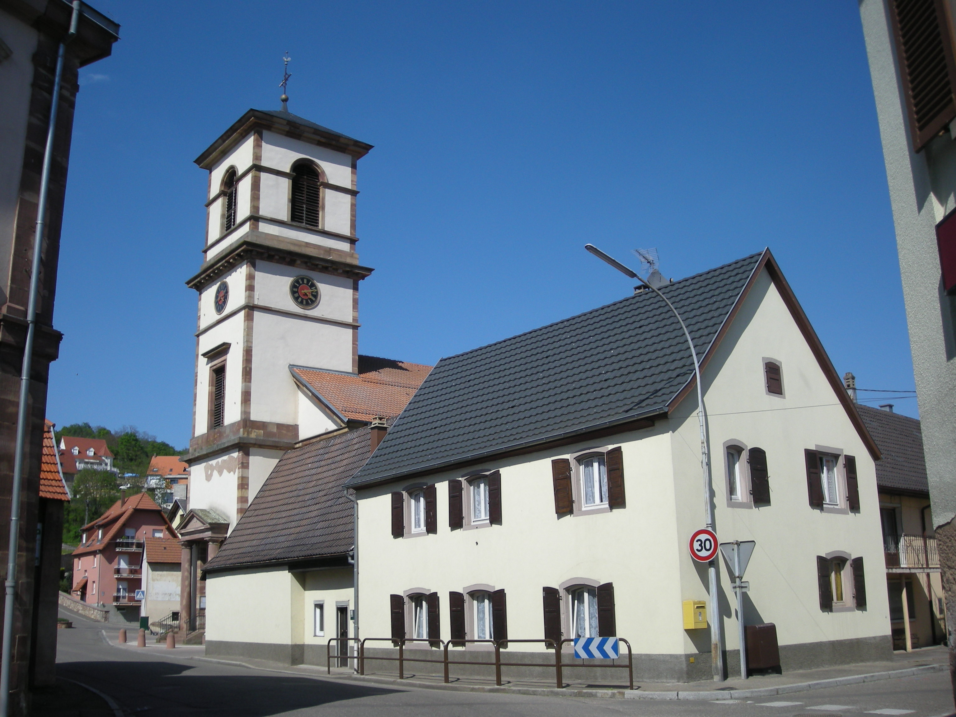 L'église Saints-Simon-et-Jude de Dinsheim-sur-Bruche (Bas-Rhin)